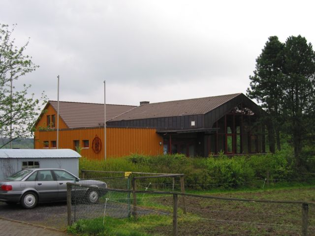 Dorfgemeinschaftshaus Allmenrod im Jahr 2002